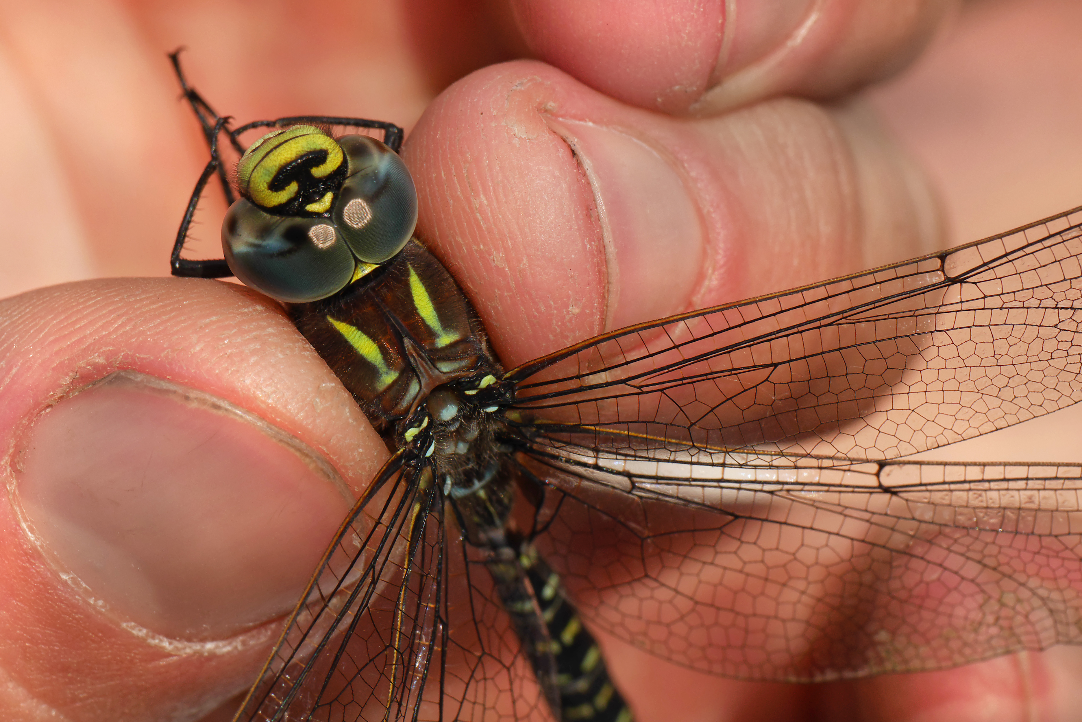 Panasonic GX7 + Leica DG Macro-Elmarit 45mm F2.8 ASPH OIS Auf dem Foto gut erkennbar sind die nagelförmigen Anthumeralstreifen, eines der Kriterien zur Unterscheidung von der häufigeren Torfmosaikjungfer (Aeshna juncea)